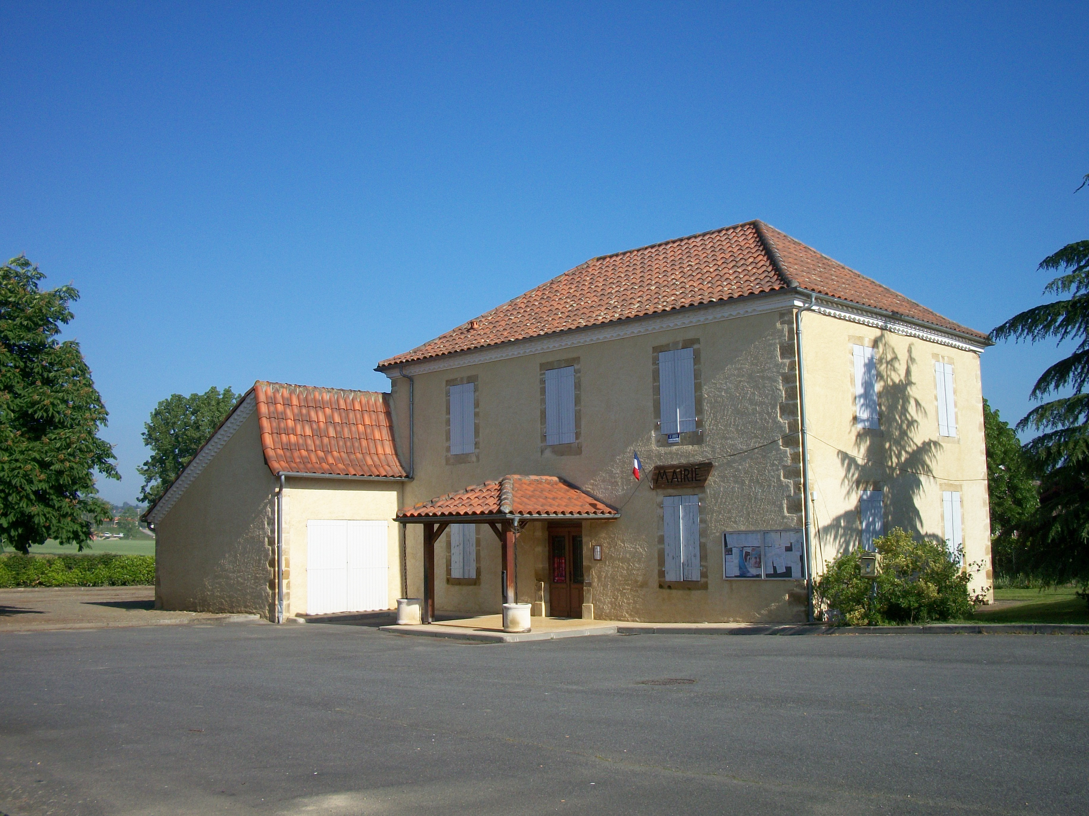 Mairie de Berdoues (Gers, France)